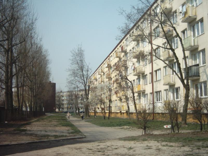 Osidle Wysoka w Piotrkowie Trybunalskim. Widok bloków.